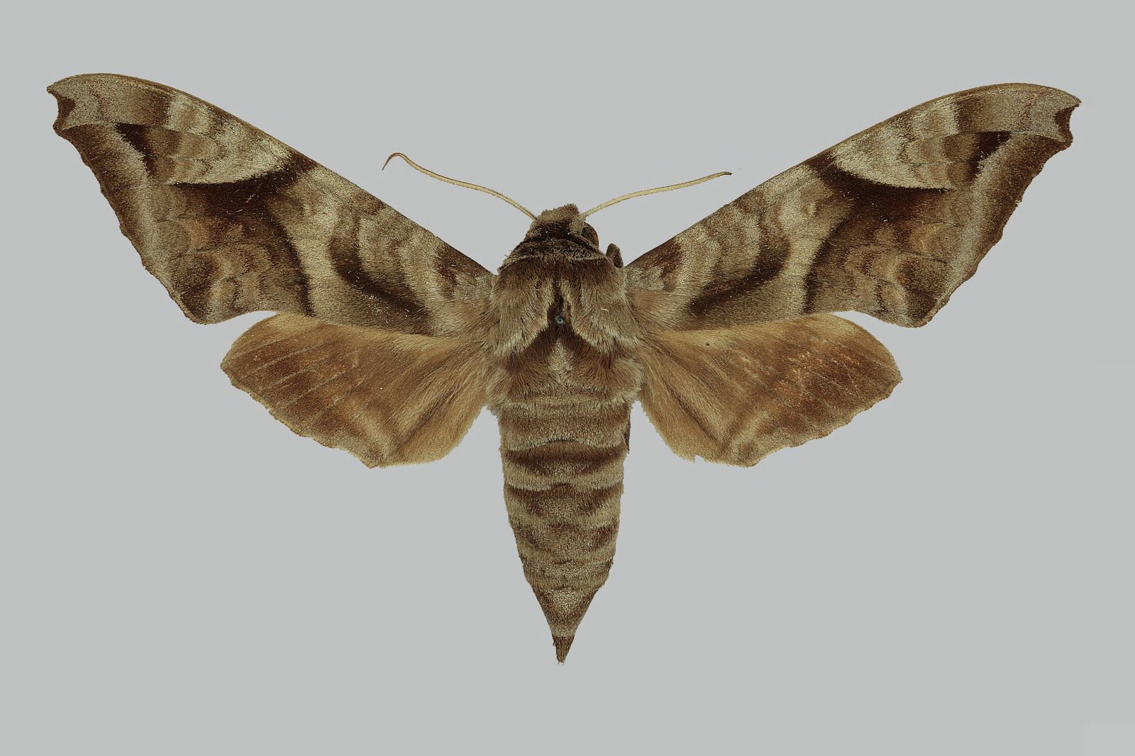 Acosmeryx naga hissarica, female, upperside. Tajikistan, Gissar, Vorzob Valley